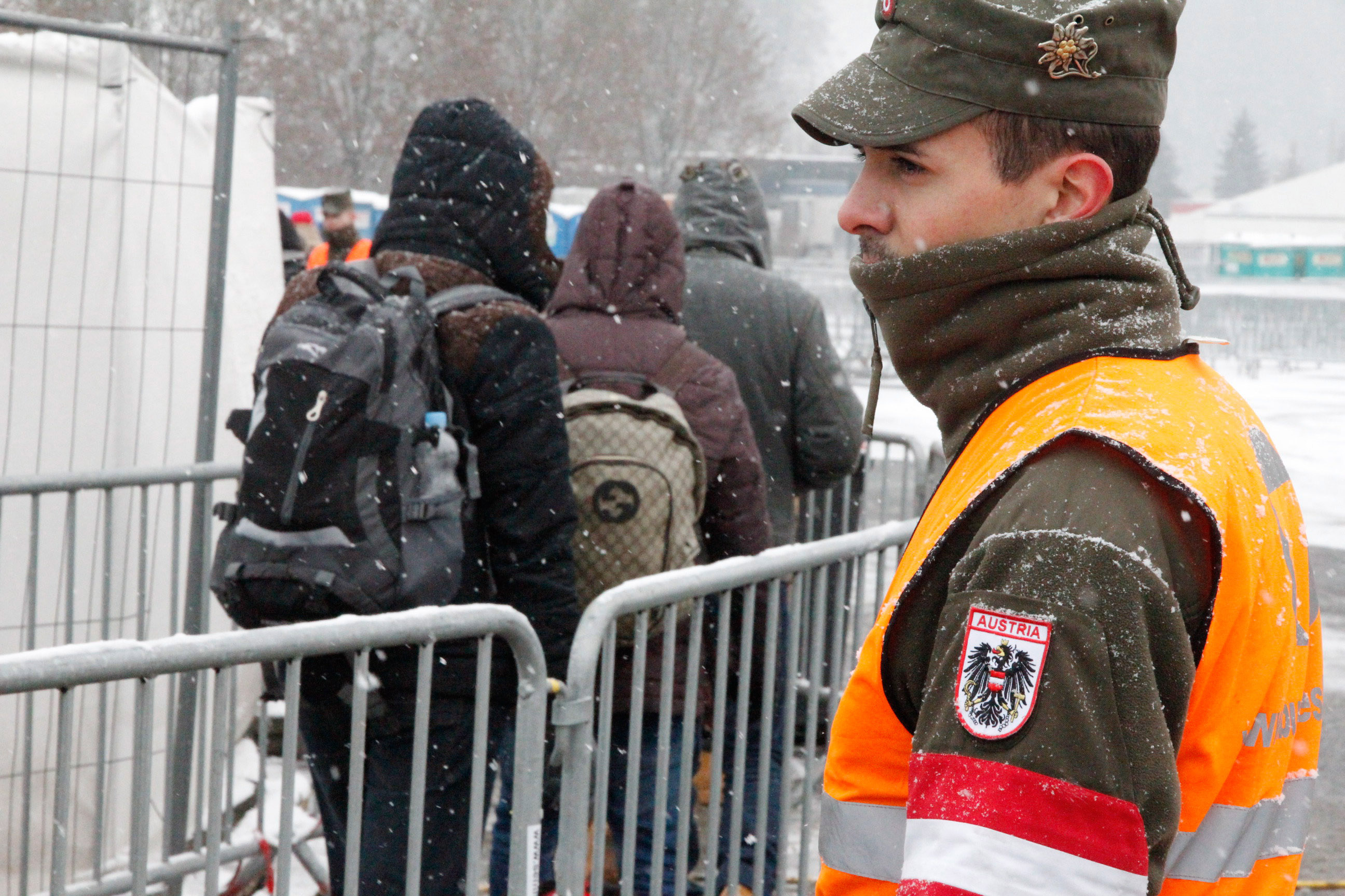 Wie in Spielfeld in der Steiermark helfen Anfang Jänner rund 1.000 Soldaten des Bundesheeres, die Flüchtlingssituation in Österreich zu kontrollieren.